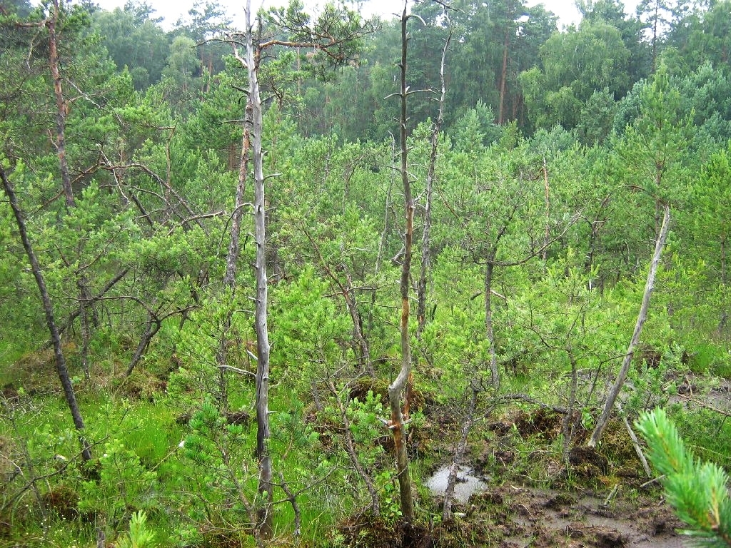 Das Moosfenn ist ein Hochmoor in den Ravensbergen in der Gemeinde Nuthetal (Brandenburg). Das Hochmoor ist als Naturschutzgebiet Moosfenn mit einer Größe von 3,95 ha ausgewiesen.